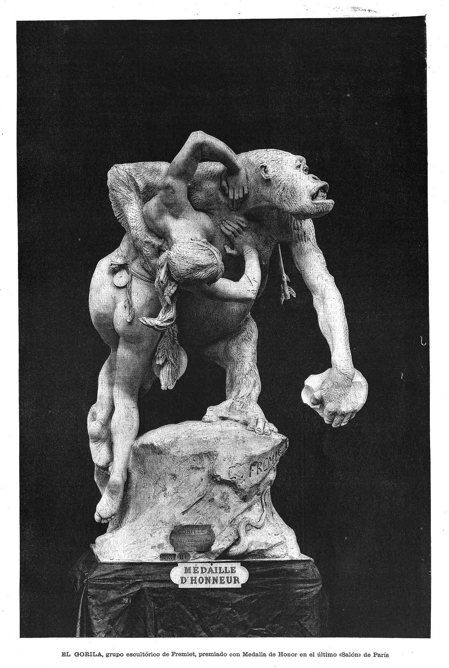 «El gorila», grupo escultórico de Fremiet, premiado con Medalla de Honor en el último «Salón» de París, en la revista española La Ilustración Artística.